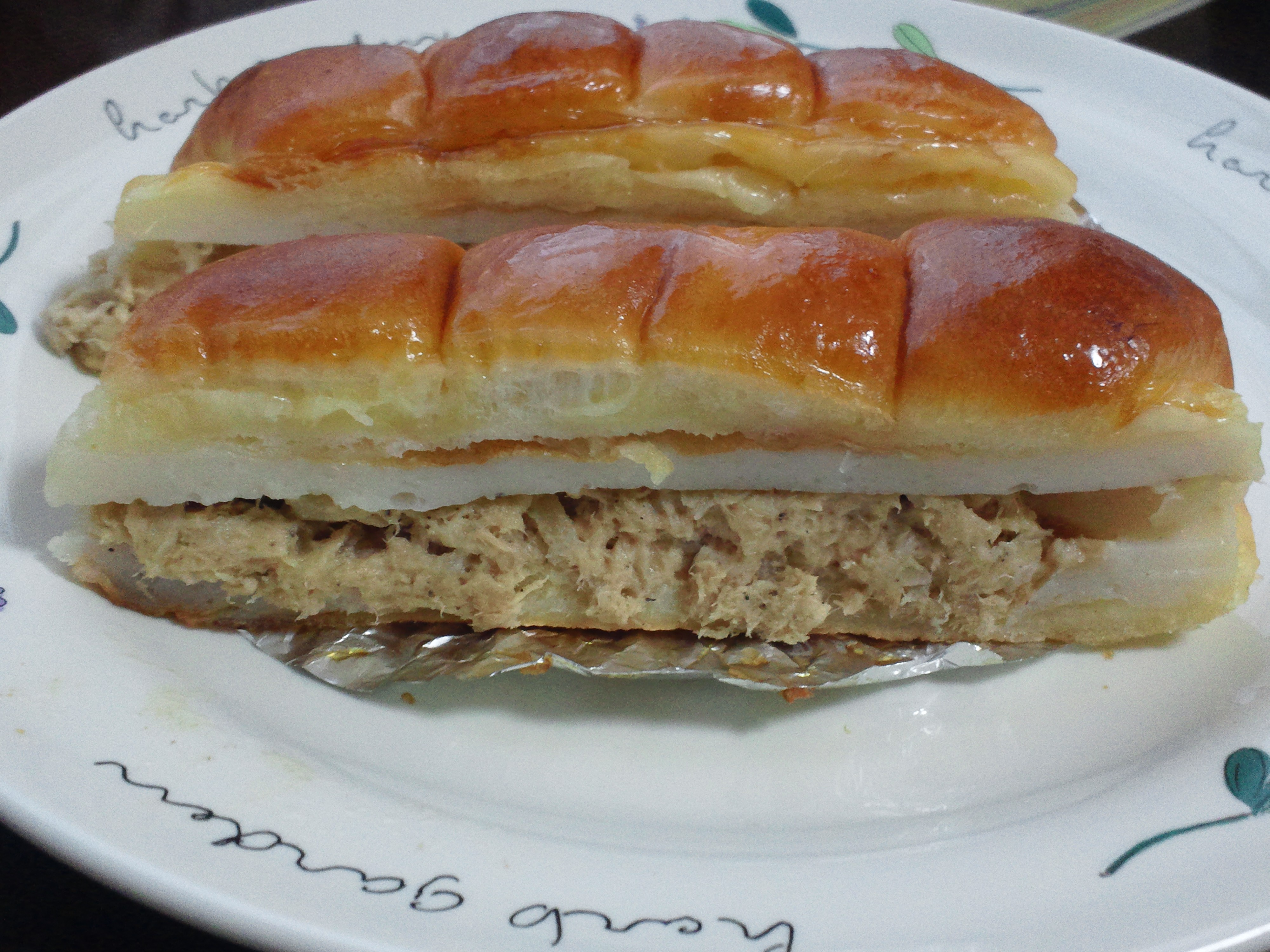 どんぐり発祥のちくわパン